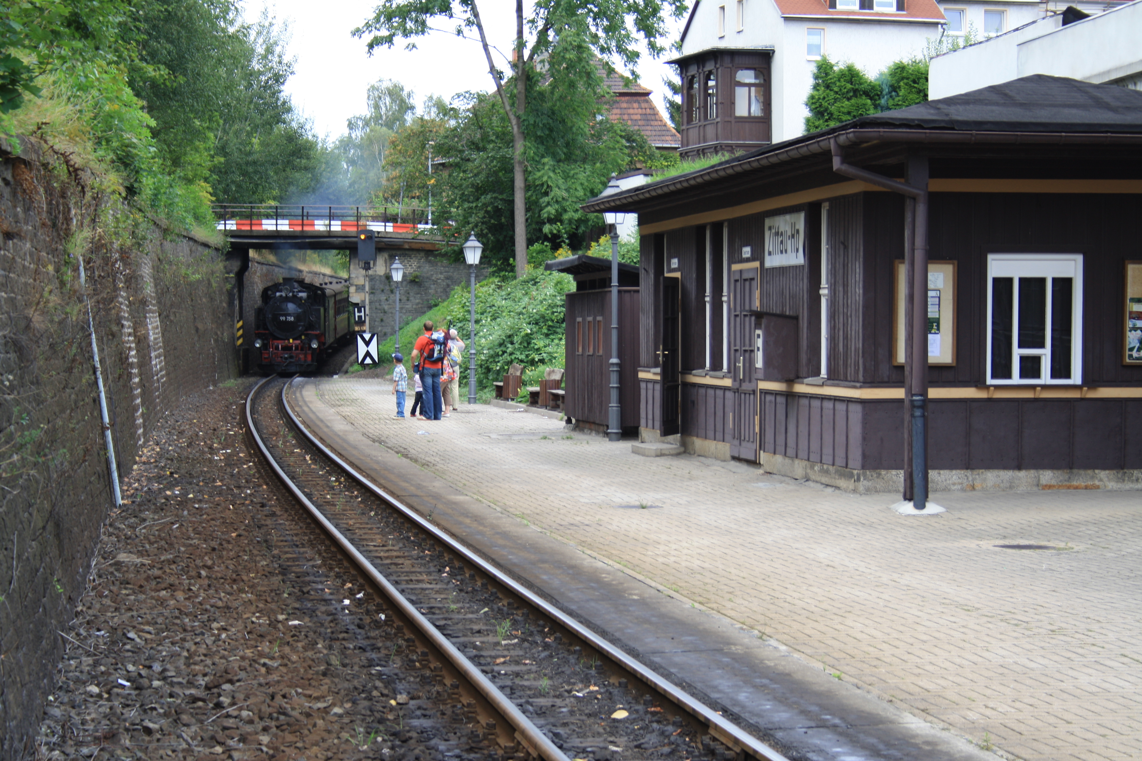 Zittau Haltepunkt mit 99 758